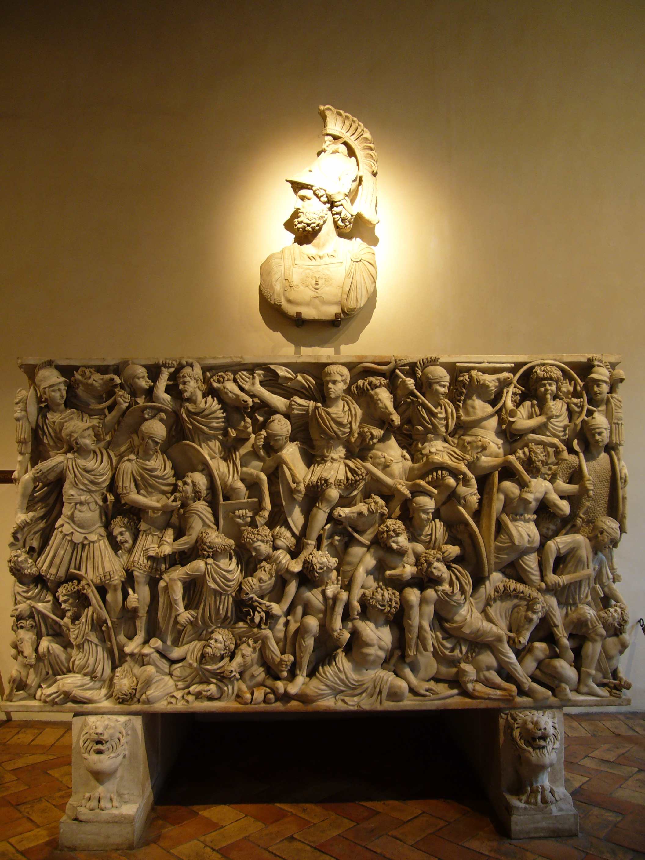 Roma, Museo Nazionale Romano a Palazzo Altemps: il sarcofago detto "Grande Ludovisi". Alla parete, testa di Marte dalla collezione Cesi, poi Ludovisi